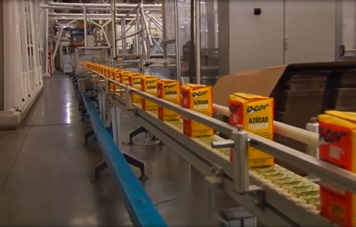 Juan Vicente Herrera visita la planta de azúcar de Acor en Olmedo (provincia de Valladolid).